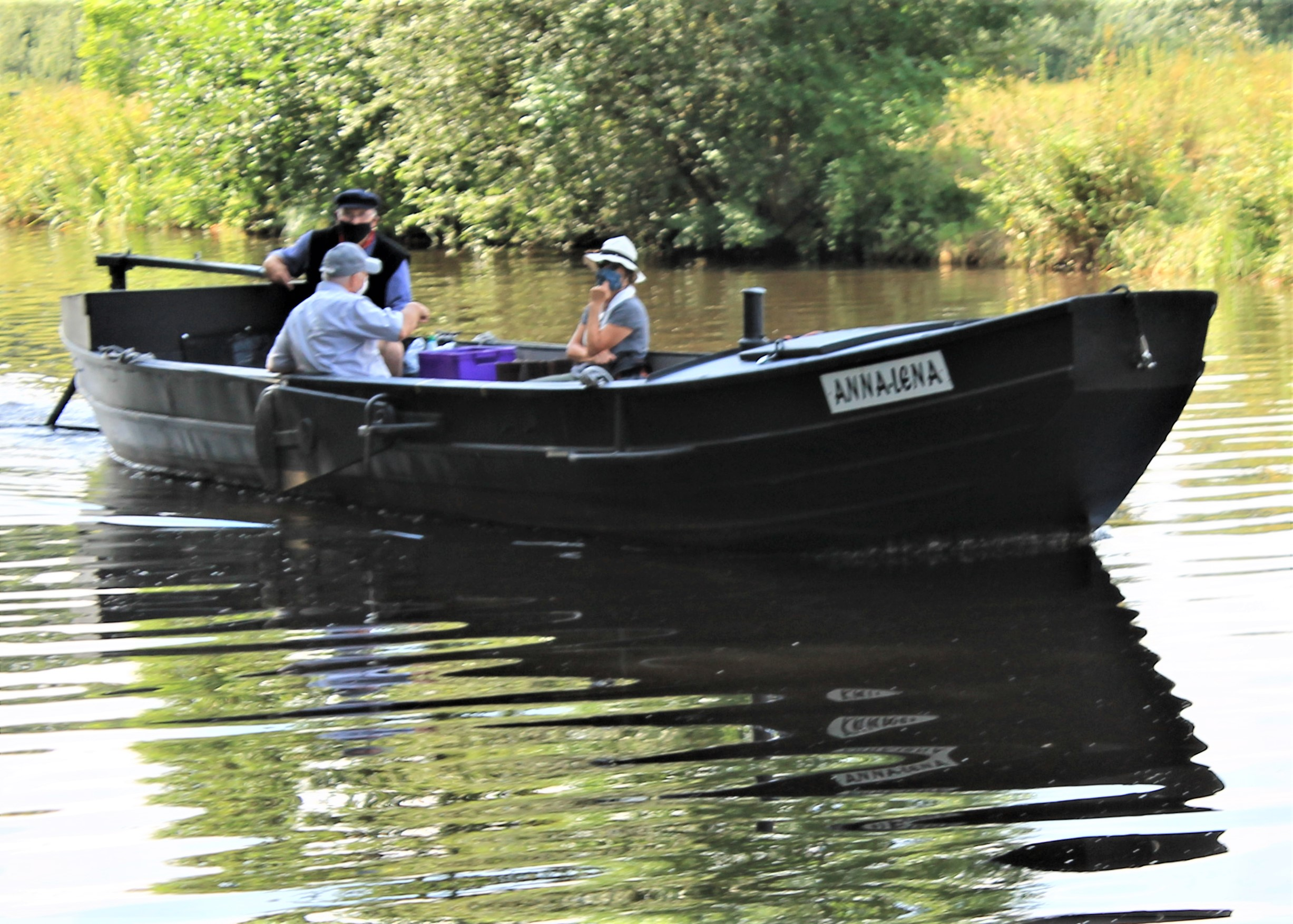 Hammehütte Neu_Helgoland, Torfschiff auf der Hamme